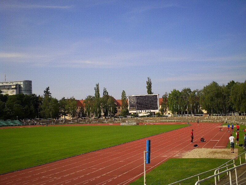 Leichtathletikstadion im Sportzentrum Cottbus, früheres Max-Reimann-Stadion